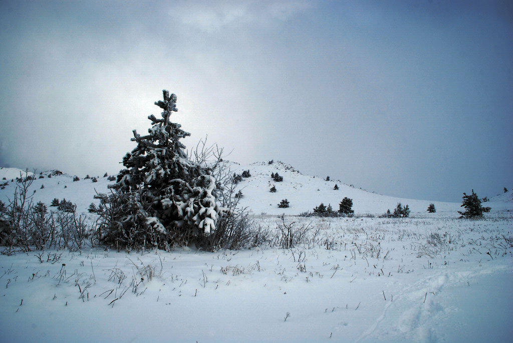 Кримський ПЗ, м. Алушта